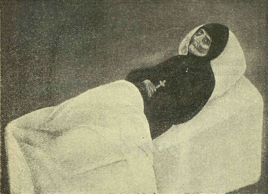 Евфросиния Колюпановская